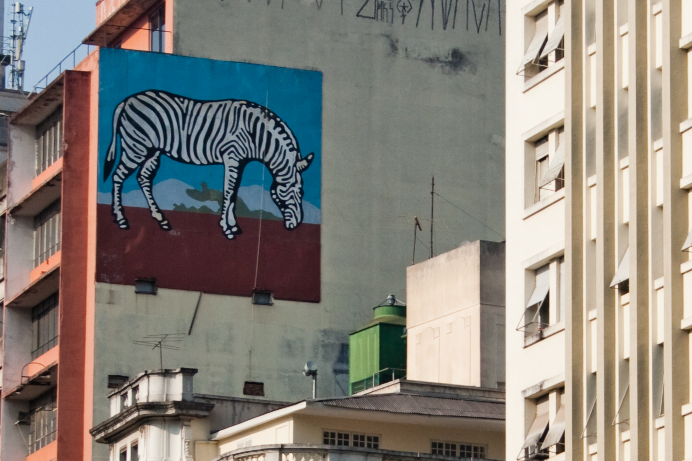 Praça da República, Centro. Foto por André Deak para o Arte Fora do Museu (